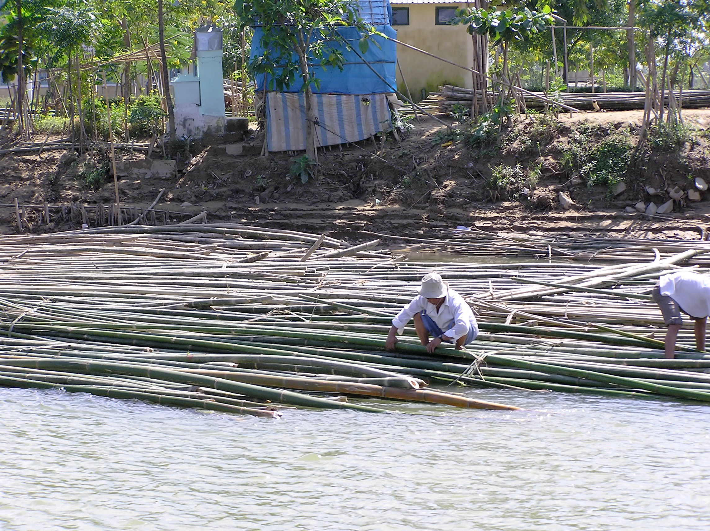 Flottage des bambous - Rivière des Parfums - Hué - Vietnam